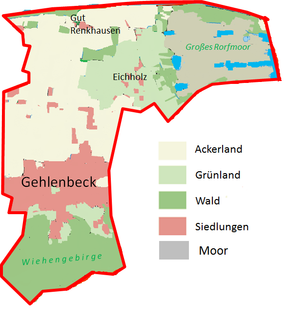 Bodennutzung Gehlenbecks